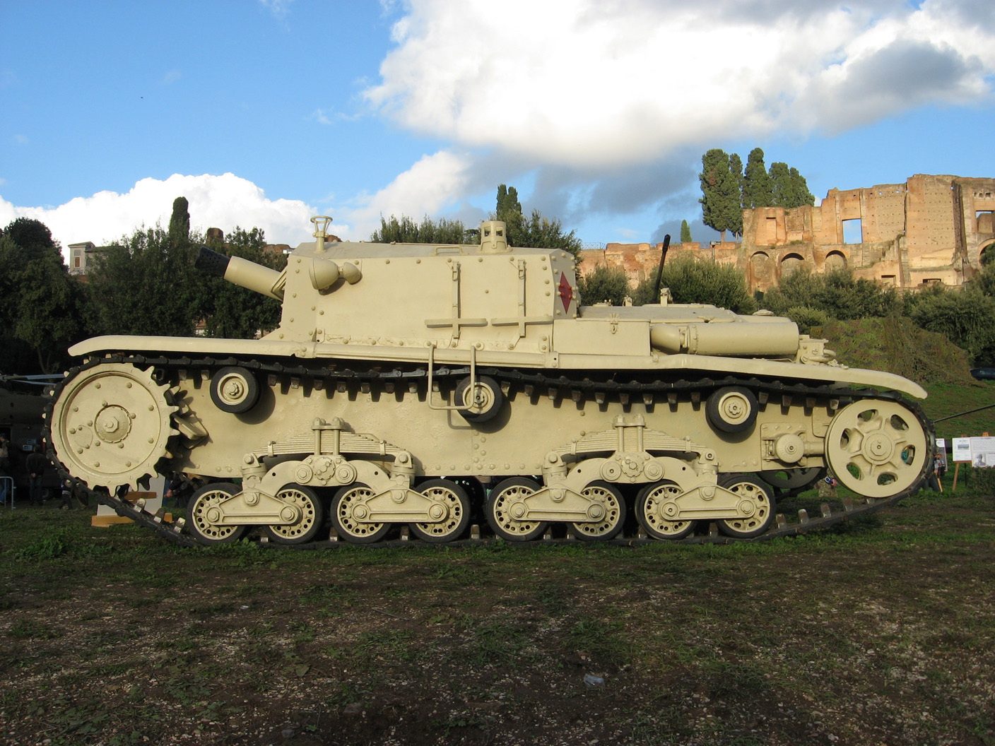 Semovente Ansaldo 75/18 (vista laterale), fotografato in occasione della Festa delle Forze Armate. L'esemplare era in esposizione pubblica al circo Massimo (Roma).